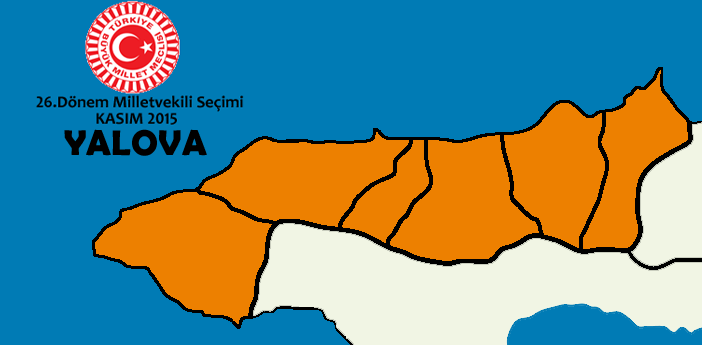 Kasım 2015 Seçimleri